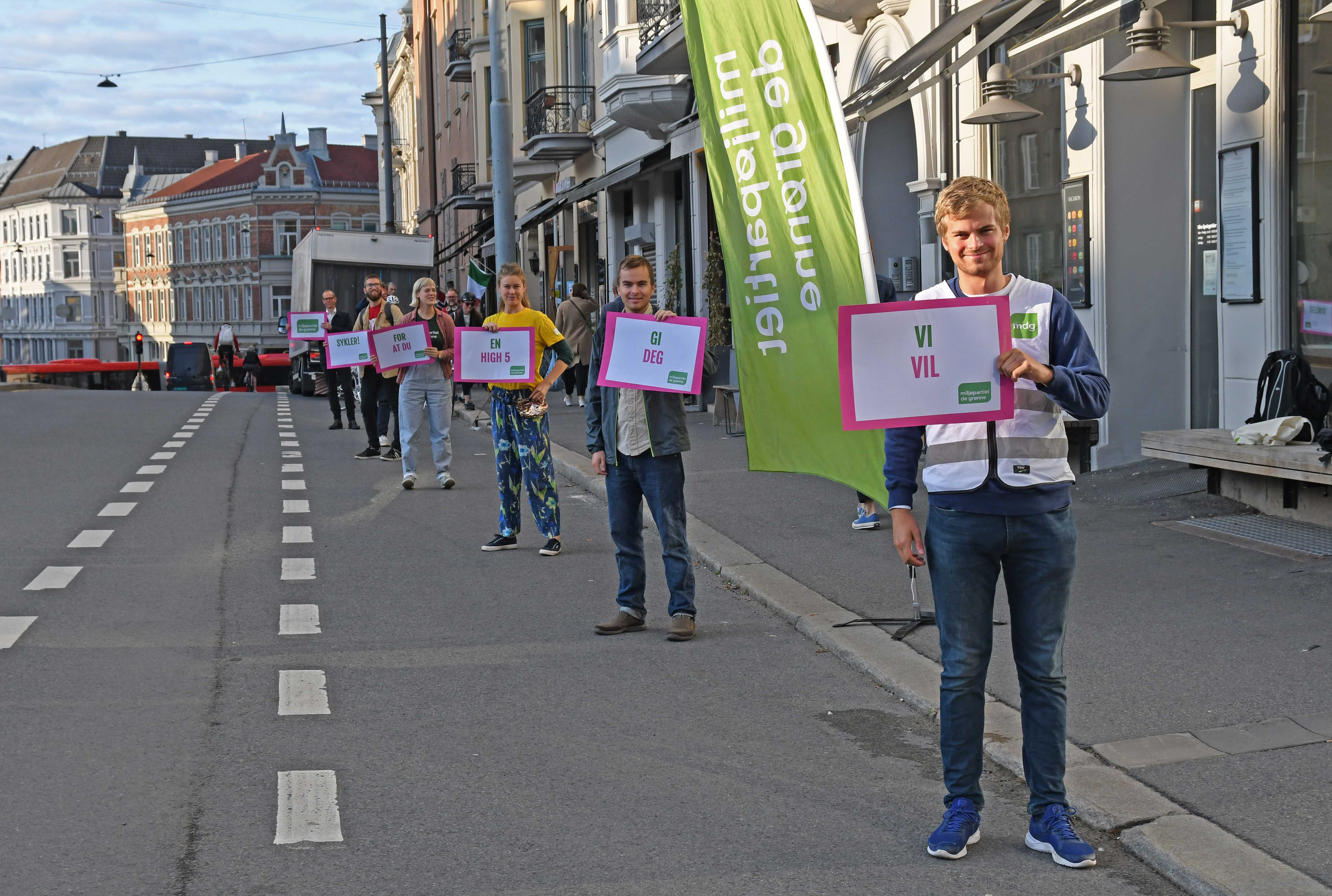 Kommunevalgkamp 2019, Ullevålsveien, Oslo, De grønne: Vi vil gi deg en high 5 for at du sykler!